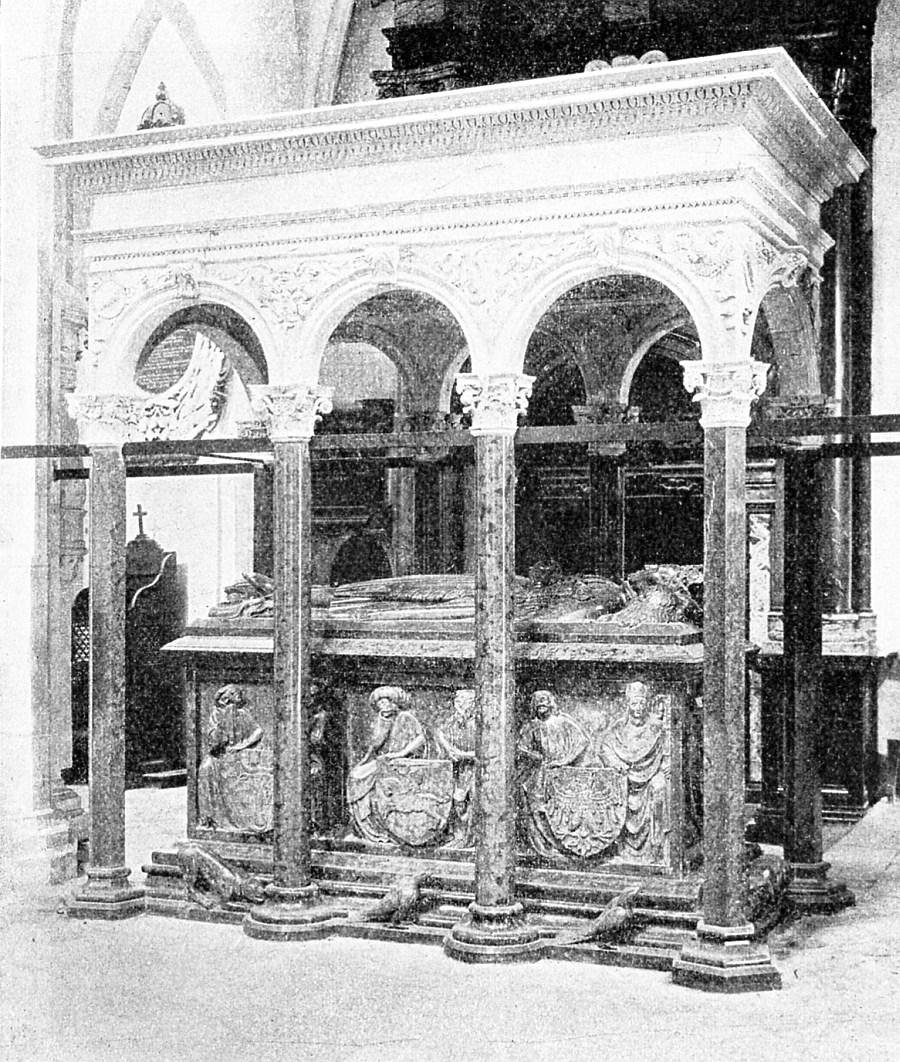 Grobowiec Jagiełły Fotografia z „Przewodnika po Katedrze Wawelskiej” (tekst pióra Lucjana Rydla) wydanego w Krakowie w 1913 roku. Wydrukowano 200 numerowanych egzemplarzy tego przewodnika, który sprzedawany był po 50 halerzy. Dochód ze sprzedaży złożony został do dyspozycji Księcia Biskupa Krakowskiego.